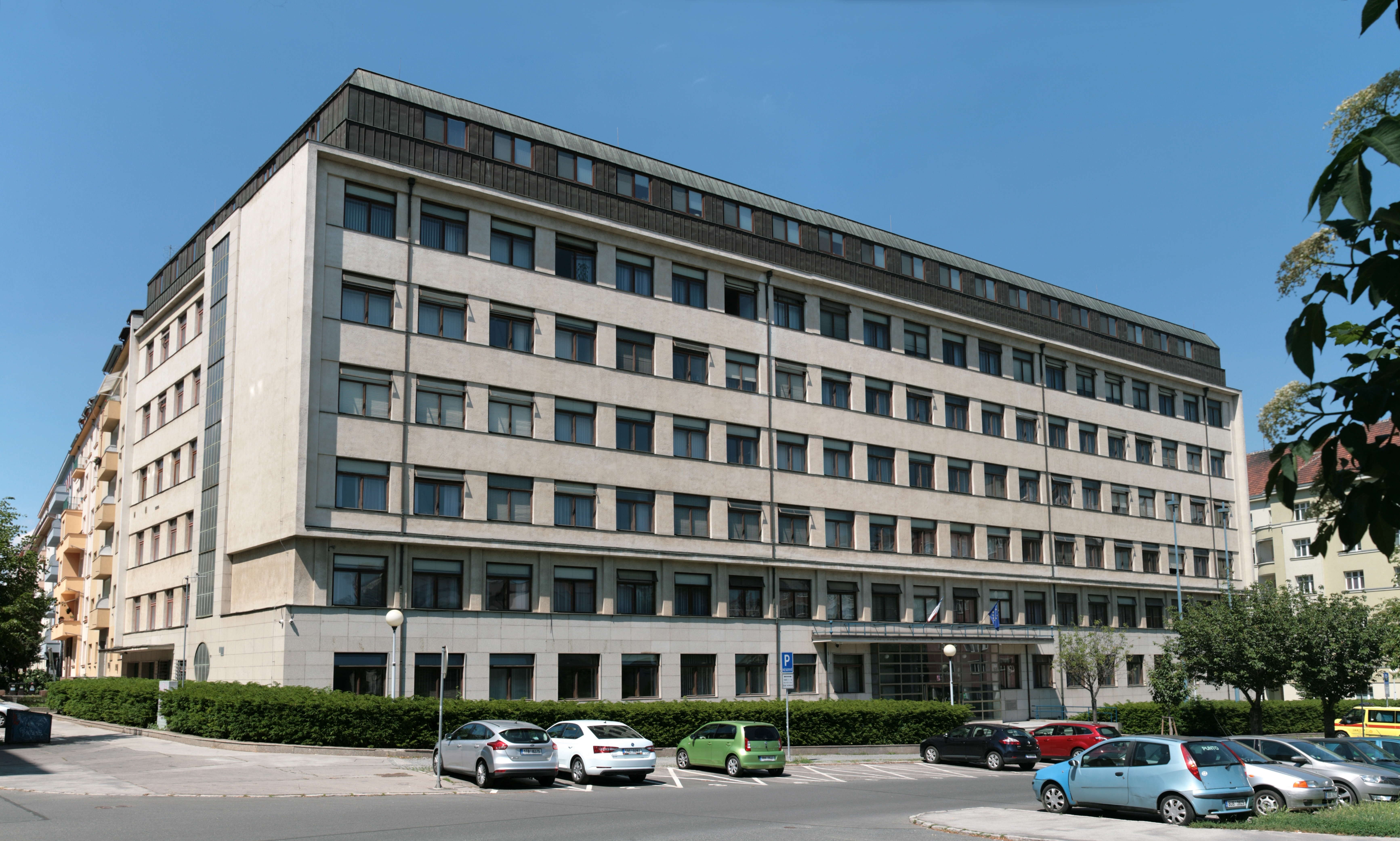 Budova Nejvyššího soudu České republiky v Burešově ulici č. 571/20 v Brně. Celkový pohled z Botanické ulice od jihozápadu.